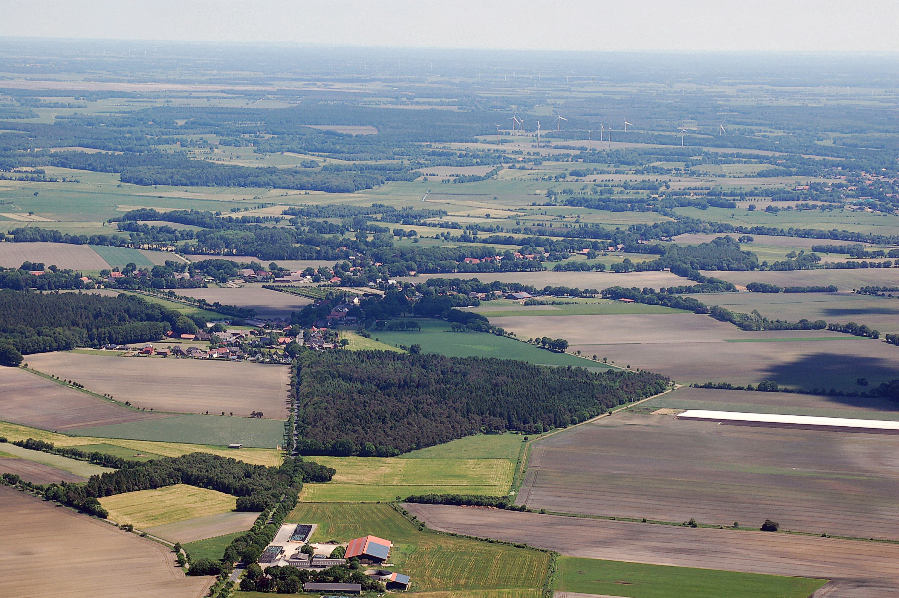 In der Bildmitte der Ort Kührstedt. Luftbilder von der Nordseeküste 2012-05